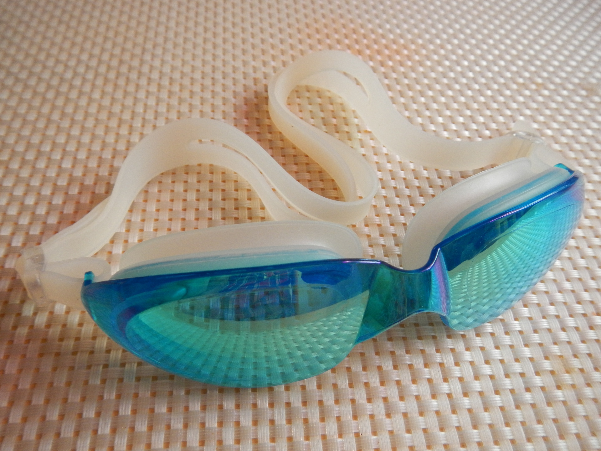 Очки для плавания с жестким корпусом и диоптриями.